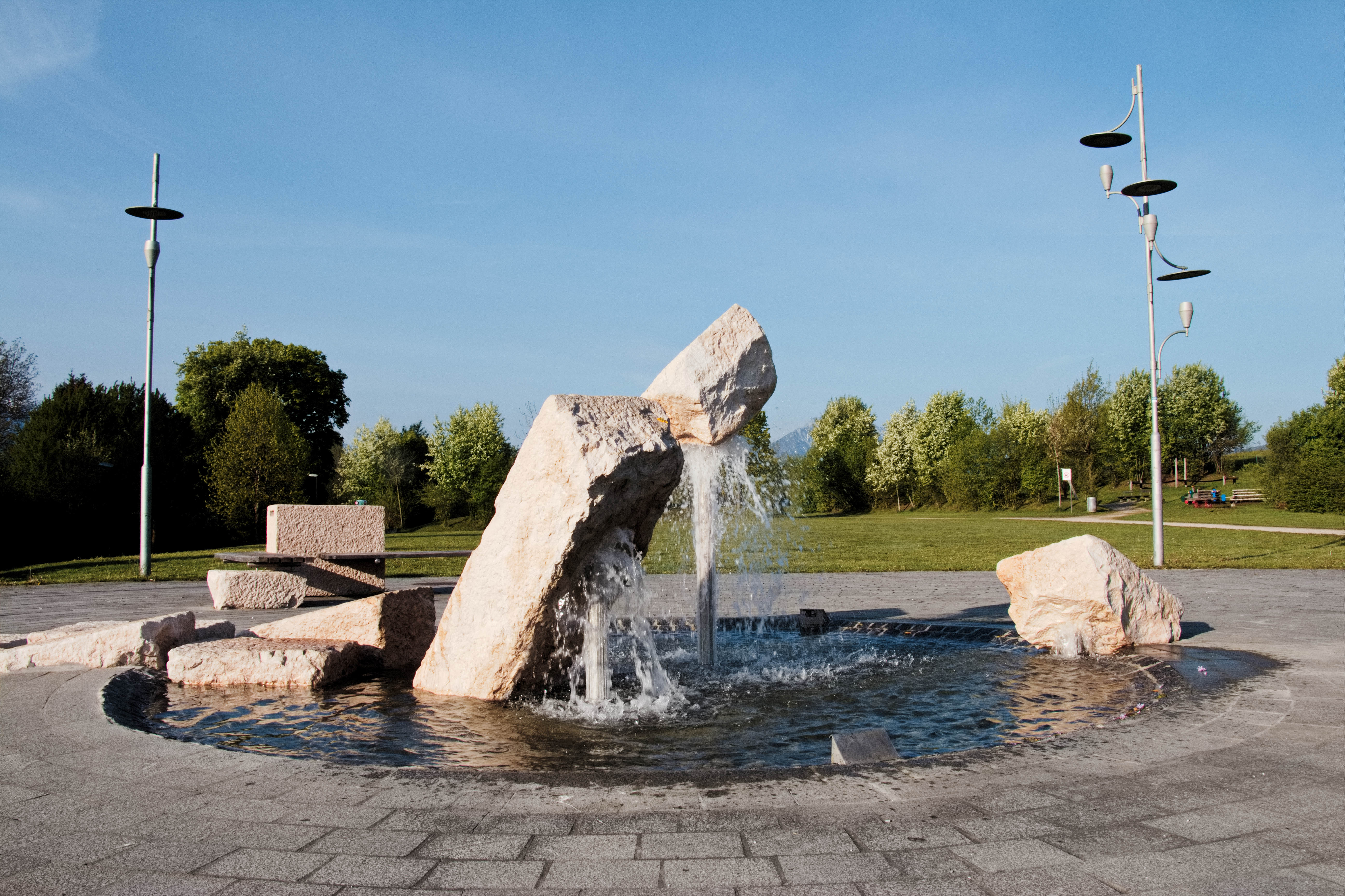 Der Brunnen auf dem Überbau des Lieferinger Tunnels in Salzburg-Liefering